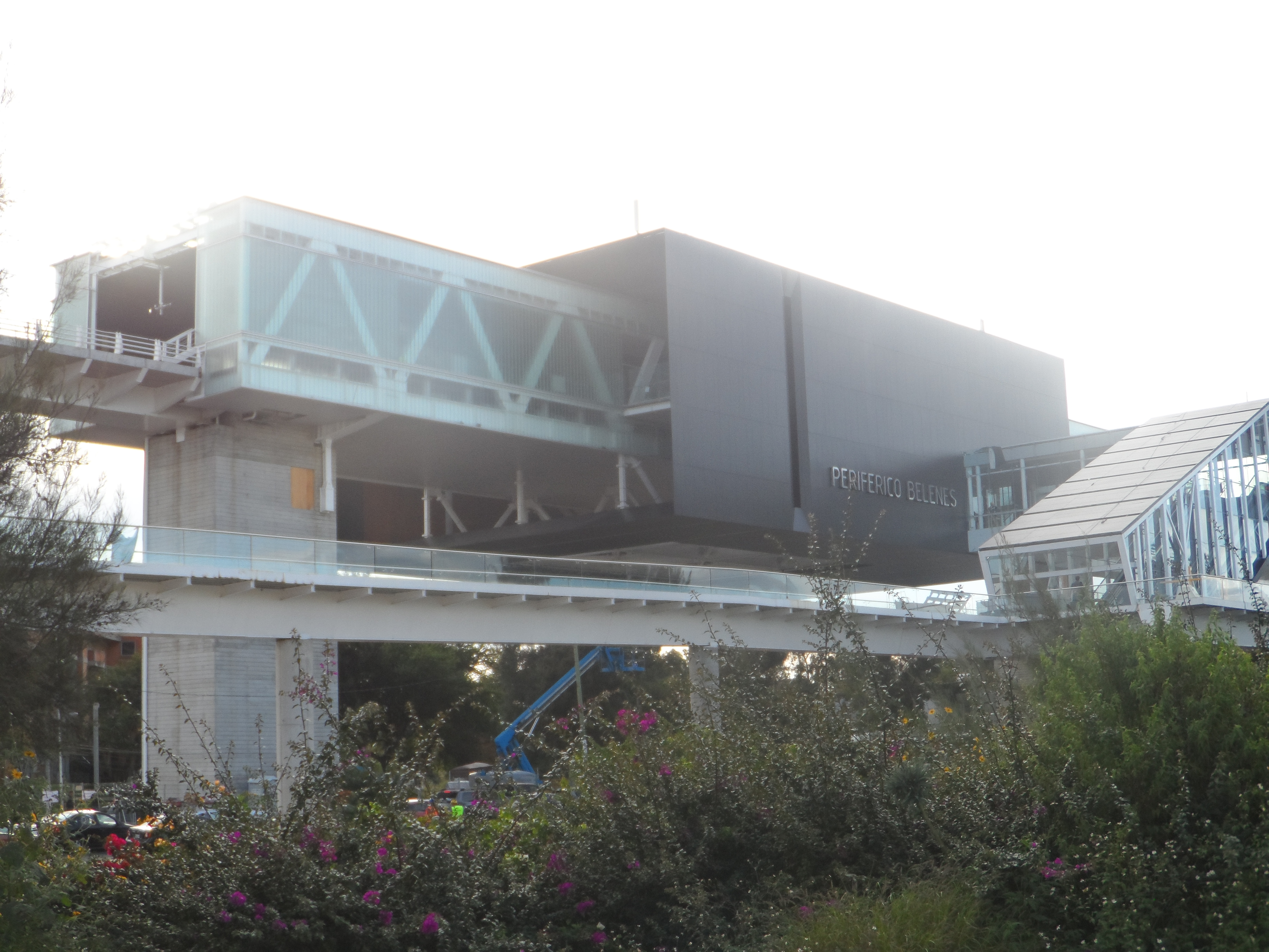 Vista externa de la estación "Periférico Belenes" de la Línea 3 del Tren Ligero de Guadalajara.